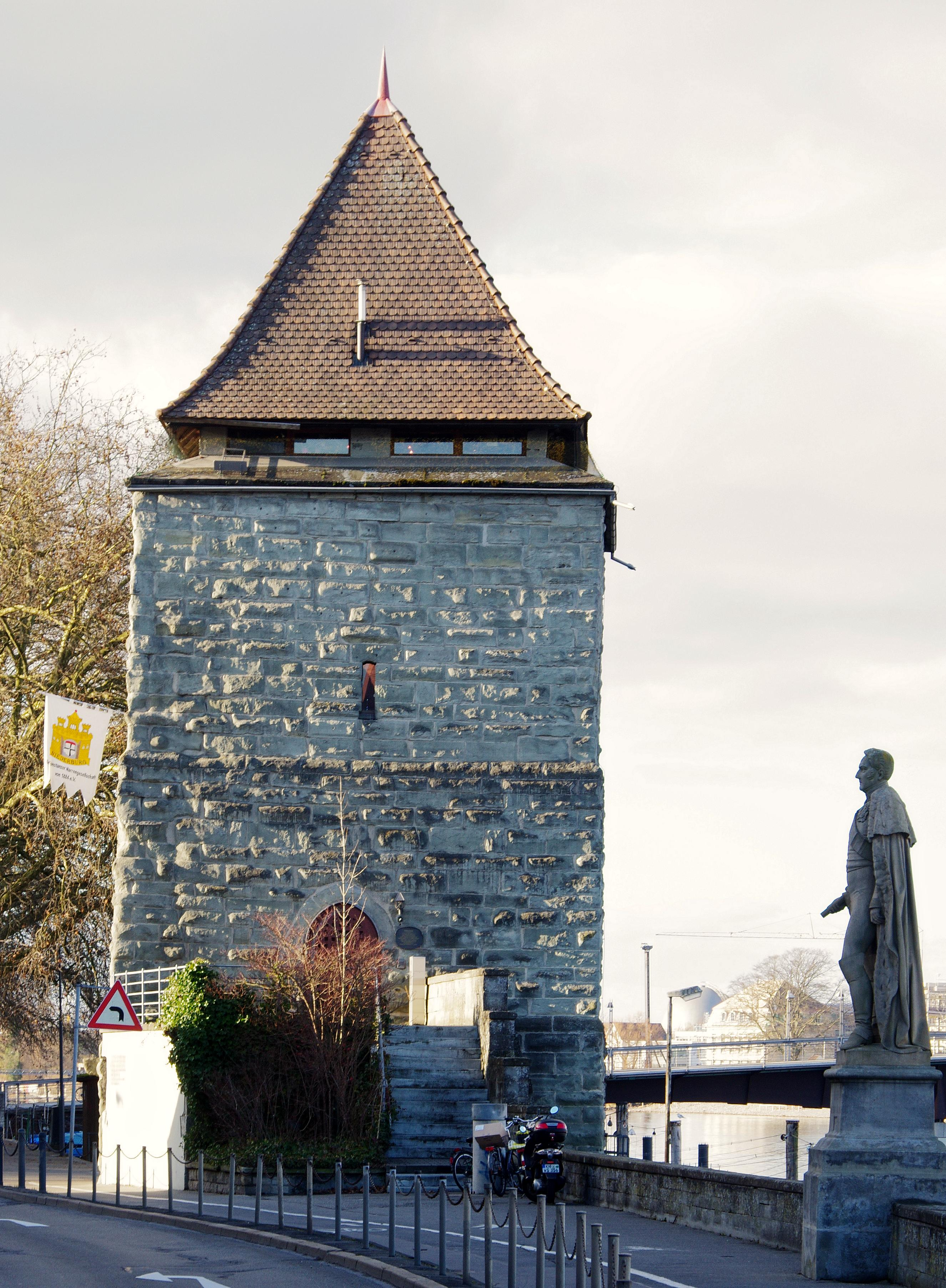 Pulver oder Judenturm